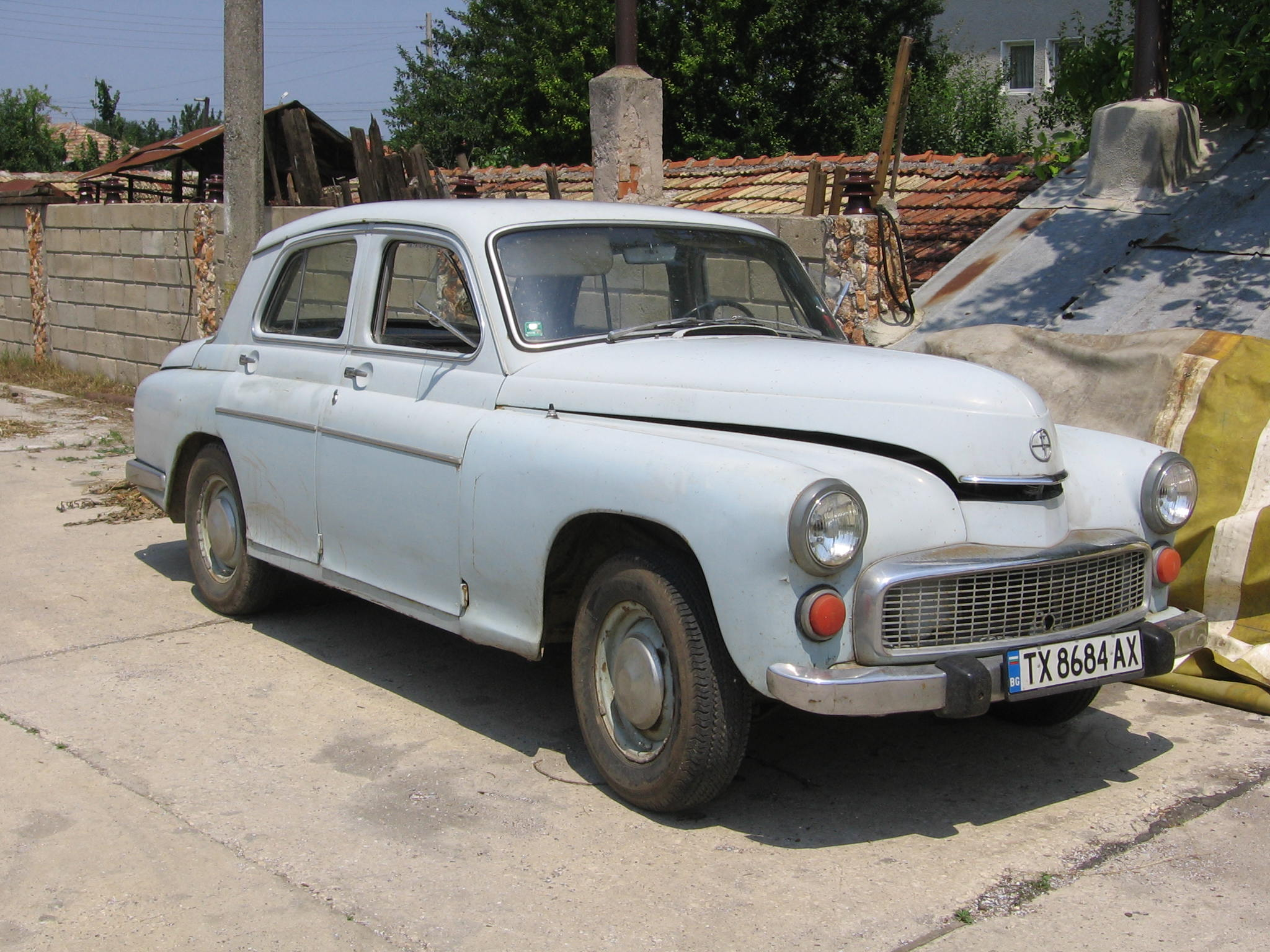 FSO Warszawa 203/204/223/224 in Bulgaria, 2007.